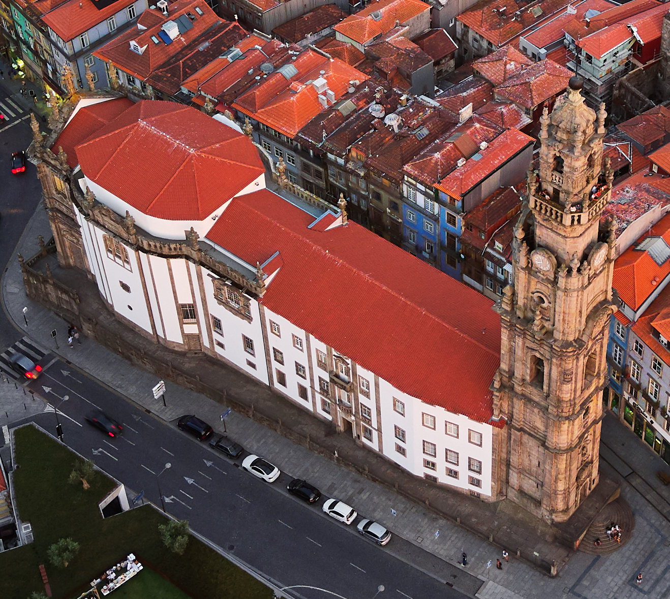 Clérigos Tower